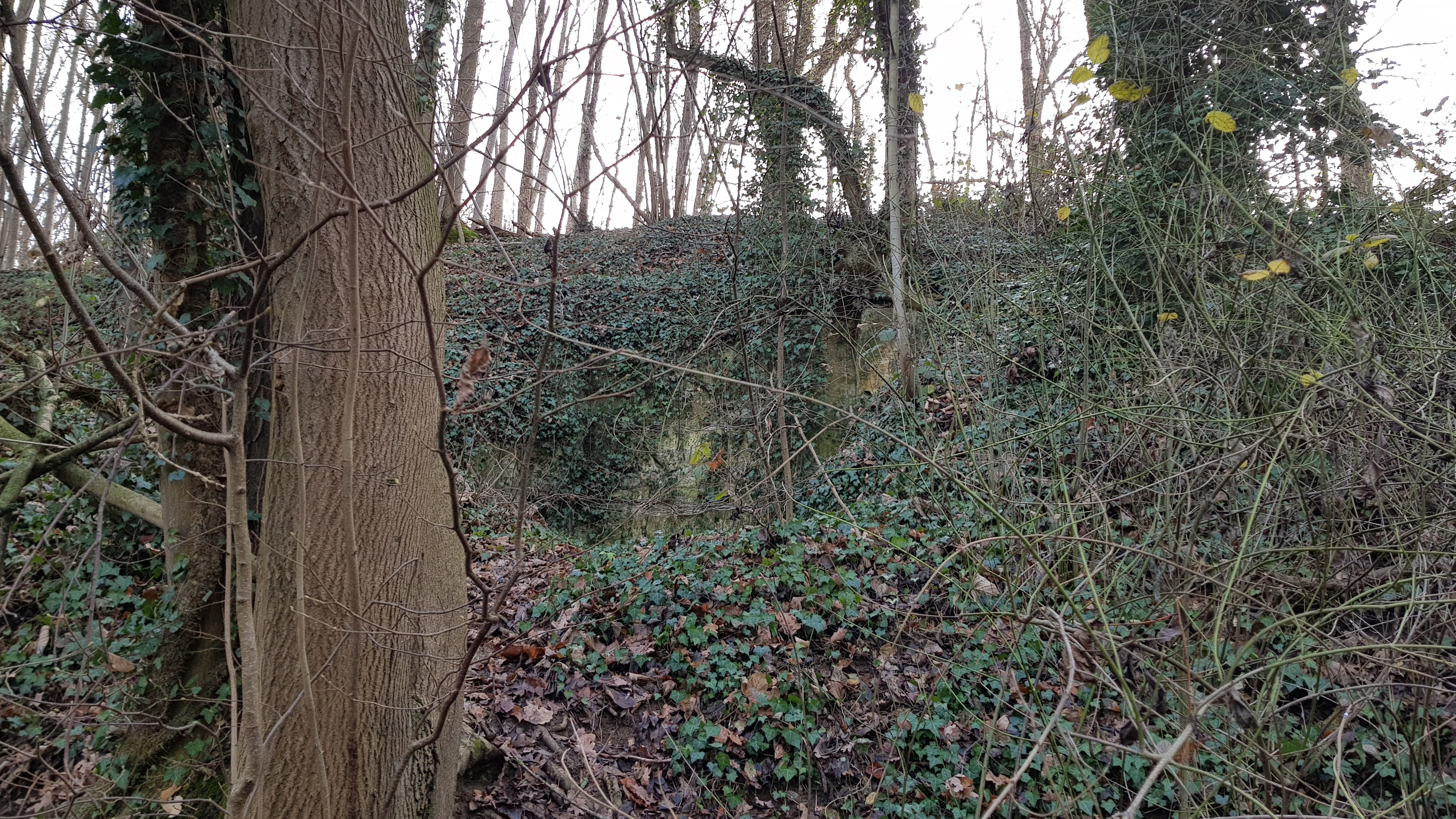 Sint-Jansboschgroeve II, Oud-Valkenburg, Nederland